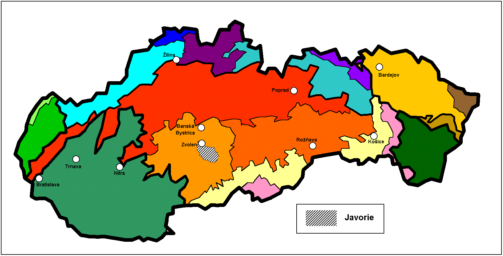 Javorie